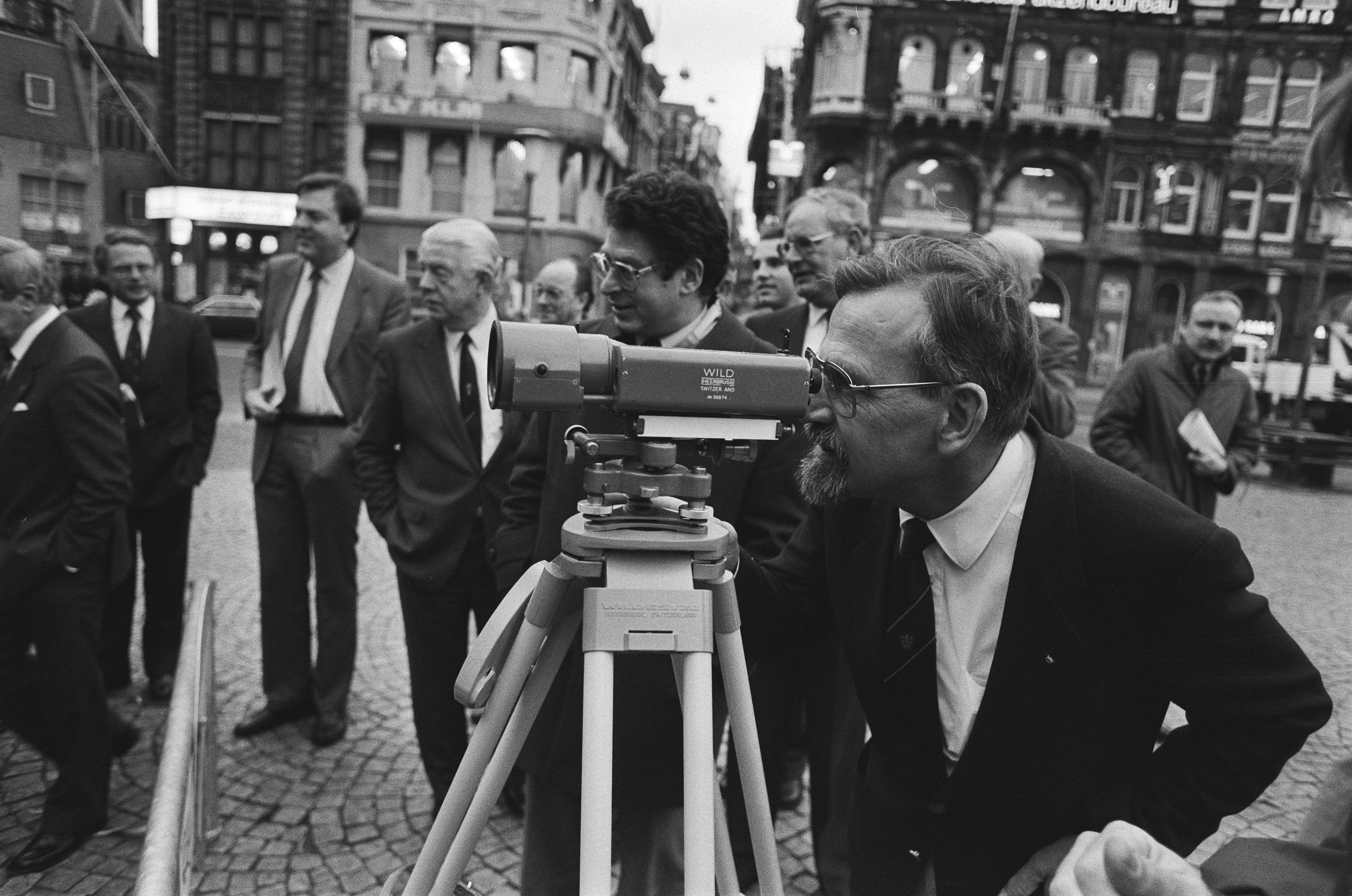 Collectie / Archief : Fotocollectie Anefo Reportage / Serie : Presentatie NAP postzegel van 60 ct in Amsterdam Beschrijving : Staatssecretaris Scherpenhuizen kijkt door een meter naar het meetpunt NAP Datum : 21 januari 1986 Locatie : Amsterdam, Noord-Holland Trefwoorden : burgemeesters, ijken, meet- en weeginstrumenten, staatssecretarissen Persoonsnaam : Scherpenhuizen, J.F., Thijn, Ed van Fotograaf : [onbekend] Auteursrechthebbende : Nationaal Archief Materiaalsoort : Negatief (zwart/wit) Nummer archiefinventaris : bekijk toegang 2.24.01.05 Bestanddeelnummer : 933-5446